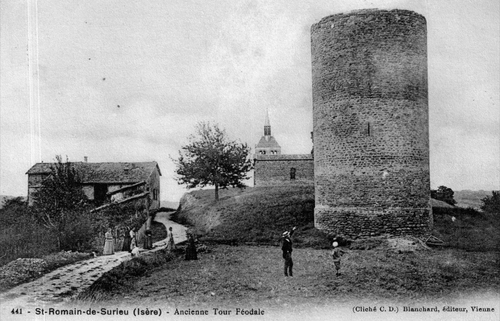 Saint-Romain-de-Surieu (Isère), ancienne tour féodale.